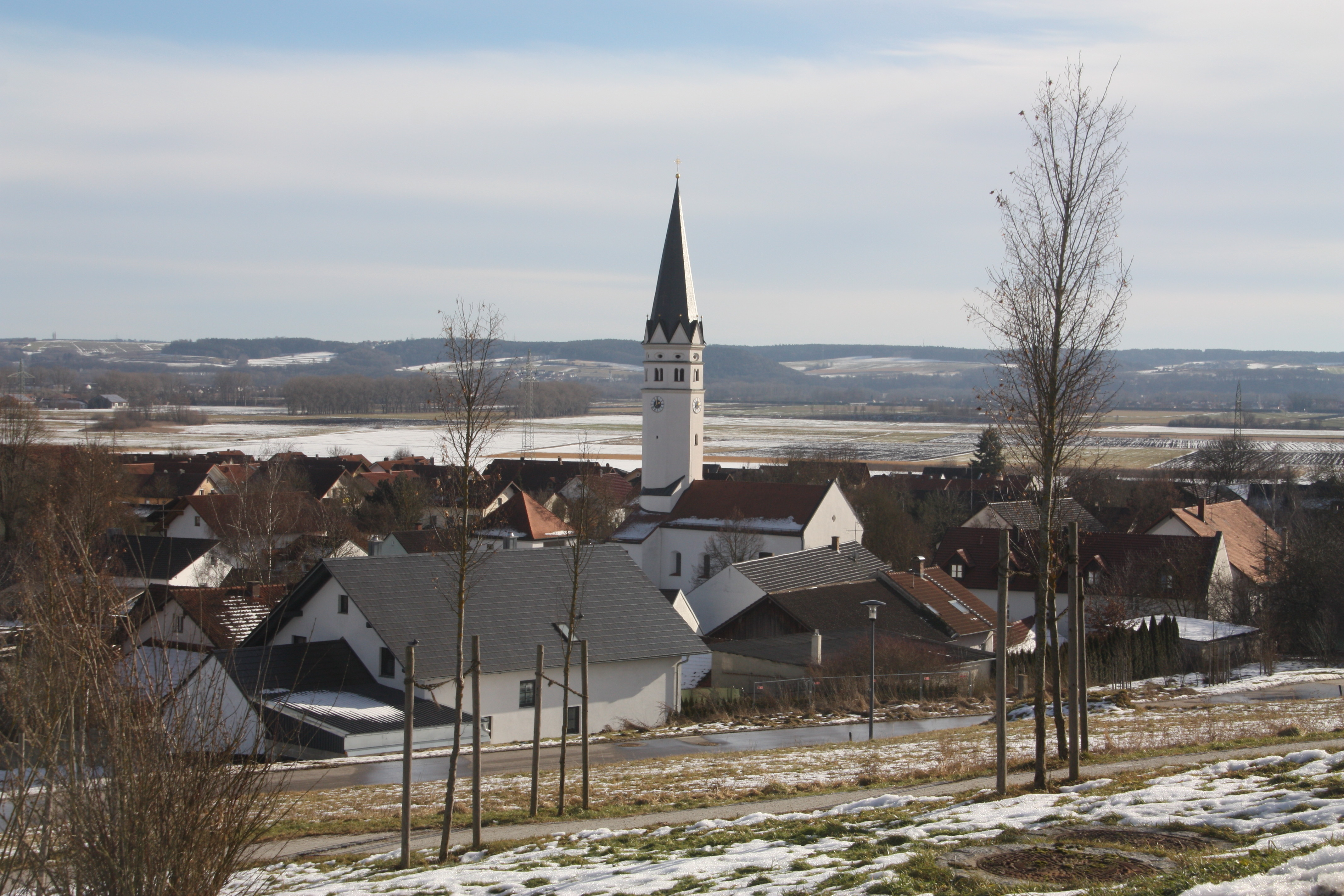 Moosthenning